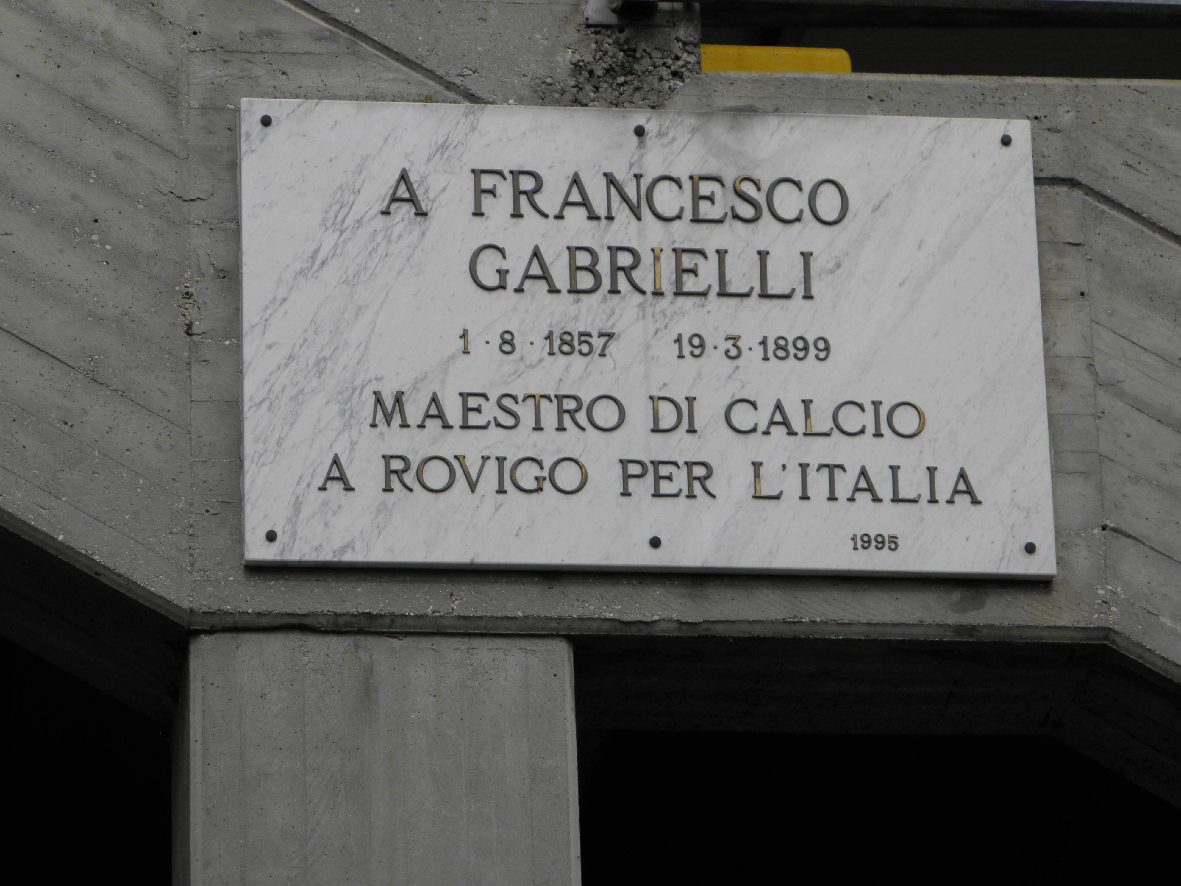 Rovigo, Stadio Francesco Gabrielli: la targa commemorativa dedicata a Francesco Gabrielli posta sul lato della tribuna.